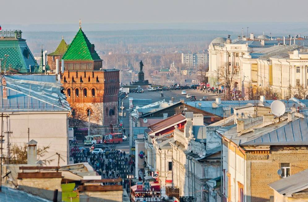 Вид на пл. Минина и Пожарского и Дмитриевскую башню Кремля с крыши на Большой Покровской улице